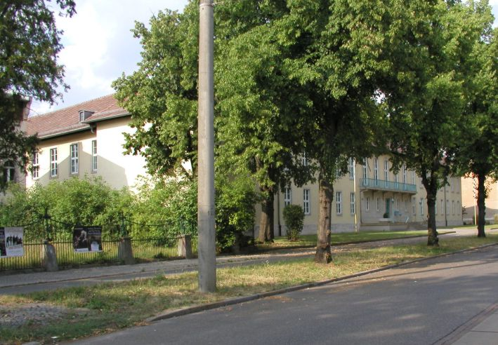 Wasserbaudirektion in der Potsdamer Berliner Vorstadt (Berliner Straße 98 - 101), erbaut 1938 - 40 seit 1993 Bundesanstalt für Immoblienaufgaben